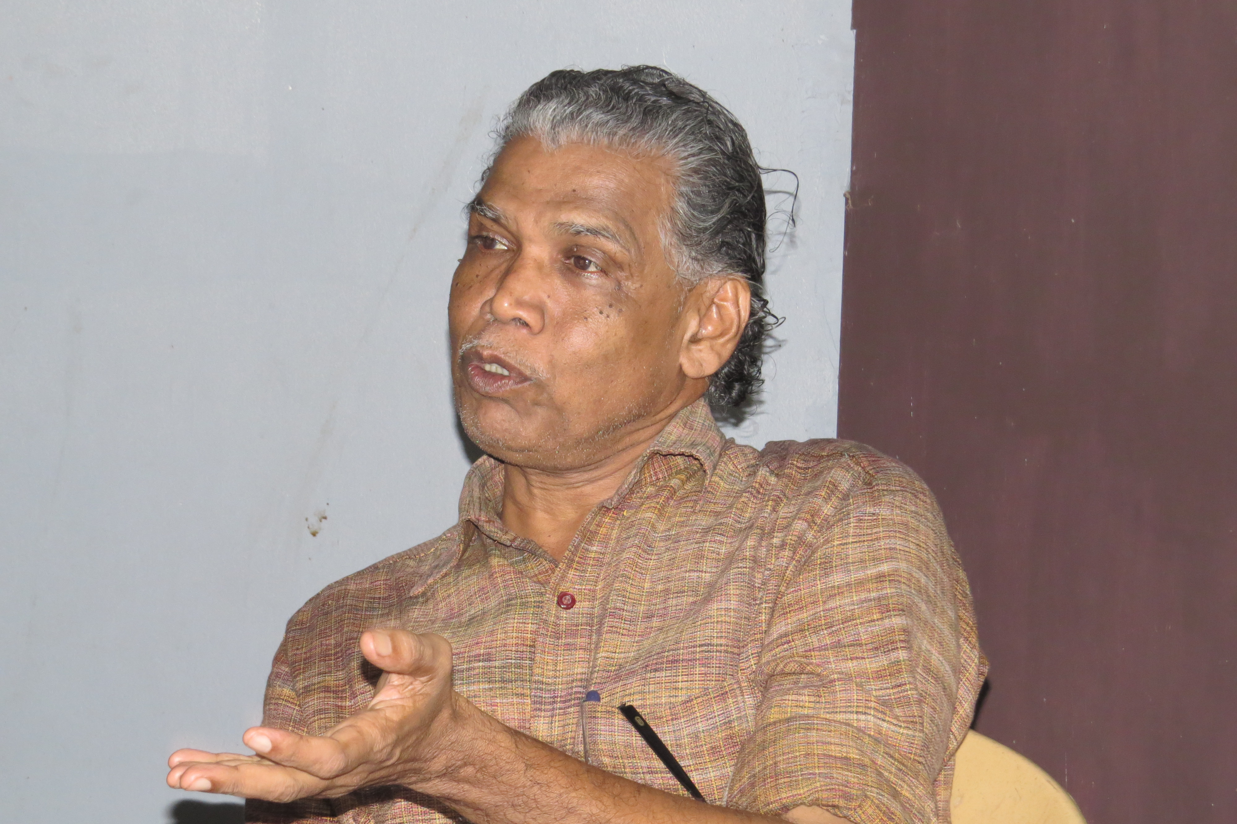 Photos by Vinayaraj